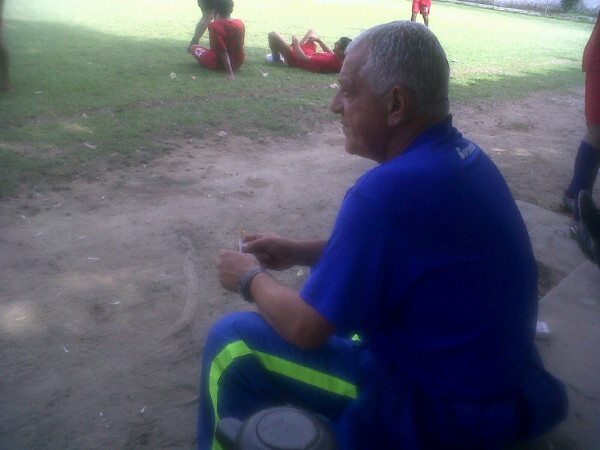 Angel Raúl Cavalleri. Entrenador del Aragua Fútbol Club